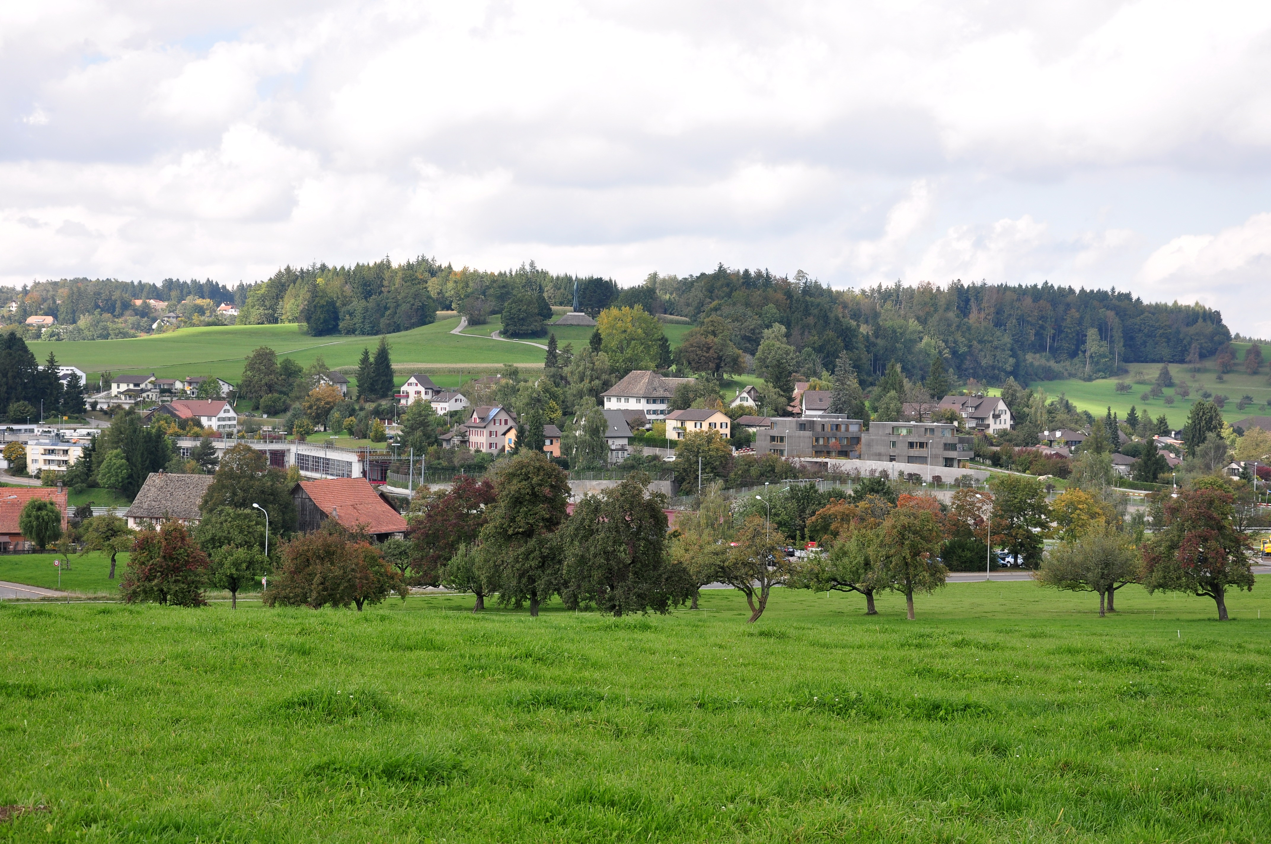 Forch (Switzerland) as seen from towards Guldenen on Pfannenstiel, Wehrmännerdenkmal in the background.